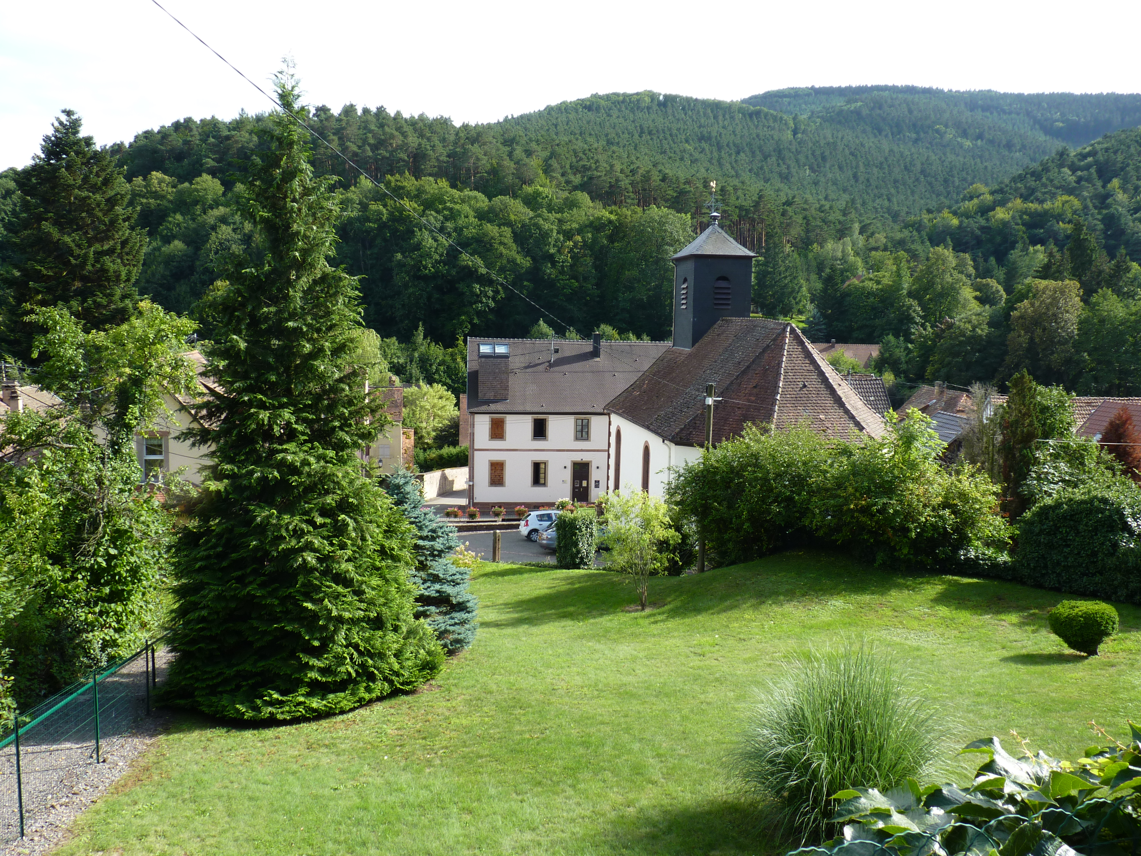 Alsace, Bas-Rhin, Boersch, Temple de Klingenthal